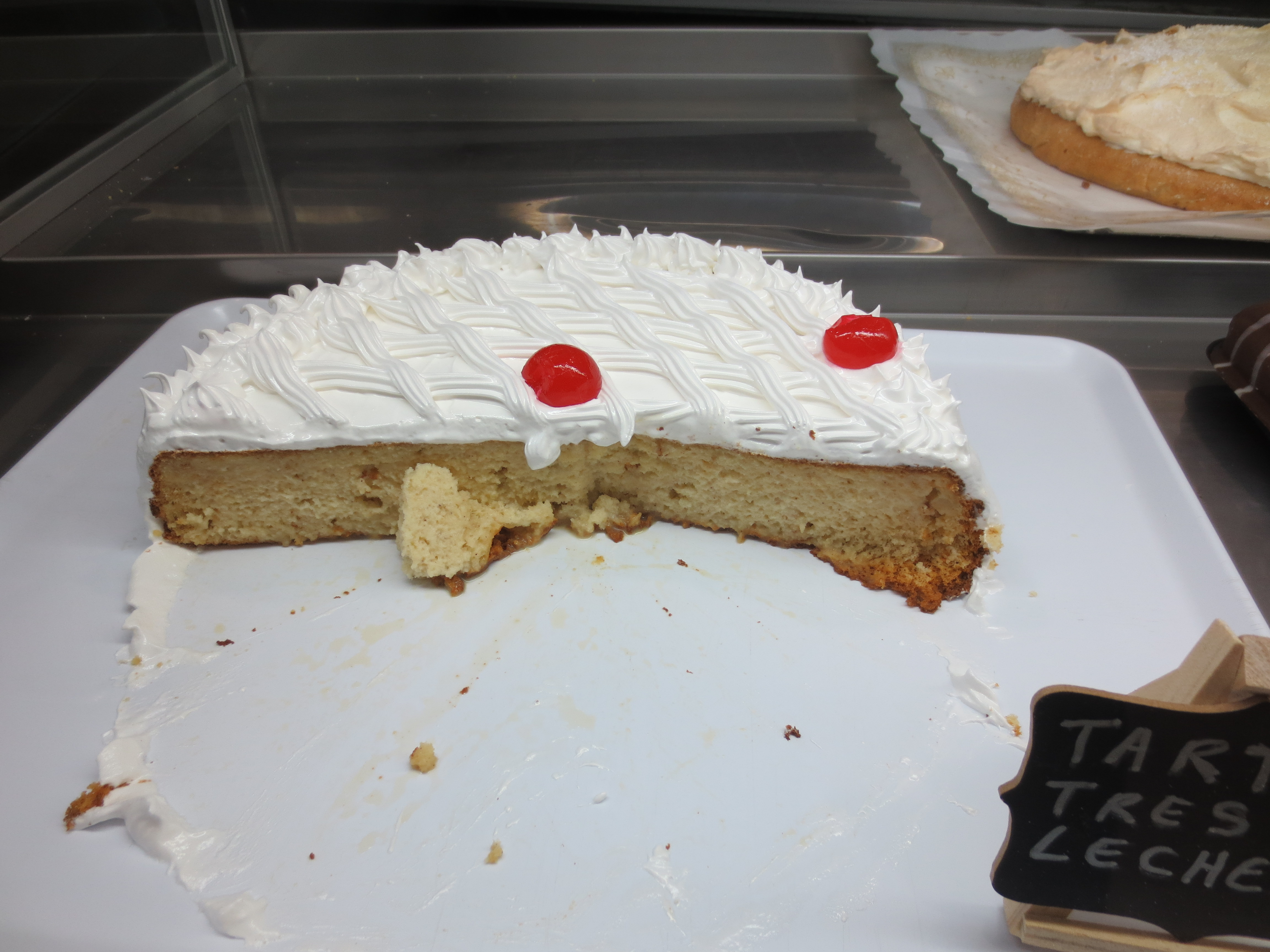 Torta tres leches preparada en España